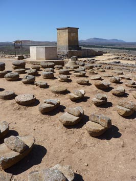 Casa romana en Numancia (Soria)